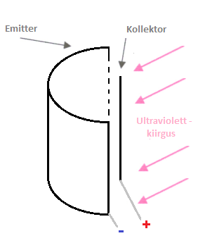 Fotoelemendi mudel, mis näitab ära selle ehituse ja tööpõhimõtte.